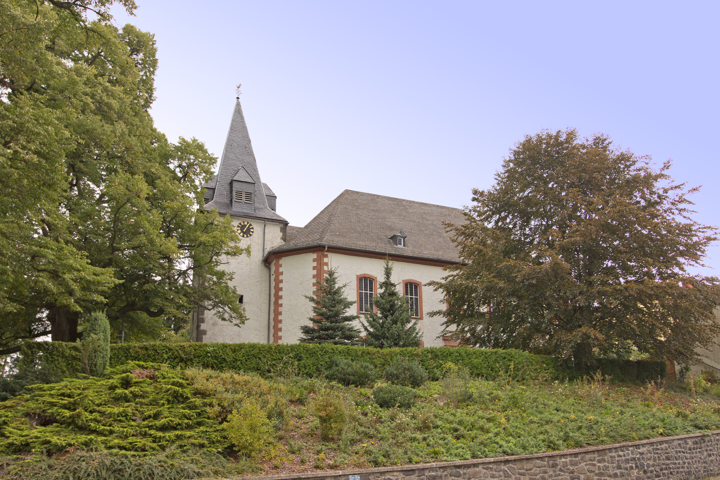 Evangelische Kirche in Bobenhausen II im Vogelsberg.